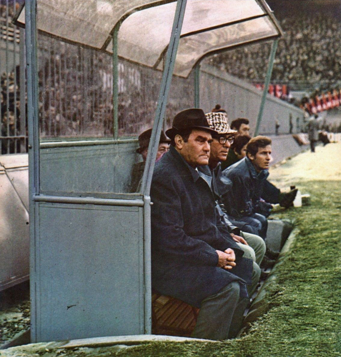 L'allenatore italiano Nereo Rocco sulla panchina del Milan, allo stadio San Siro di Milano, nella stagione 1970-71; s'intravede anche il calciatore Giovanni Trapattoni (a destra).